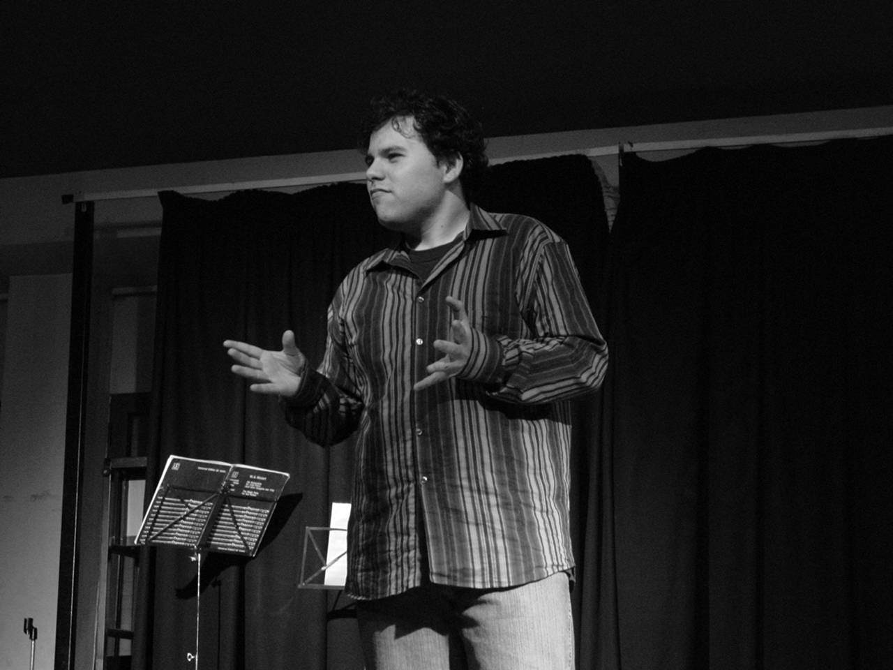 monòleg de Toni Mata a Sabadell